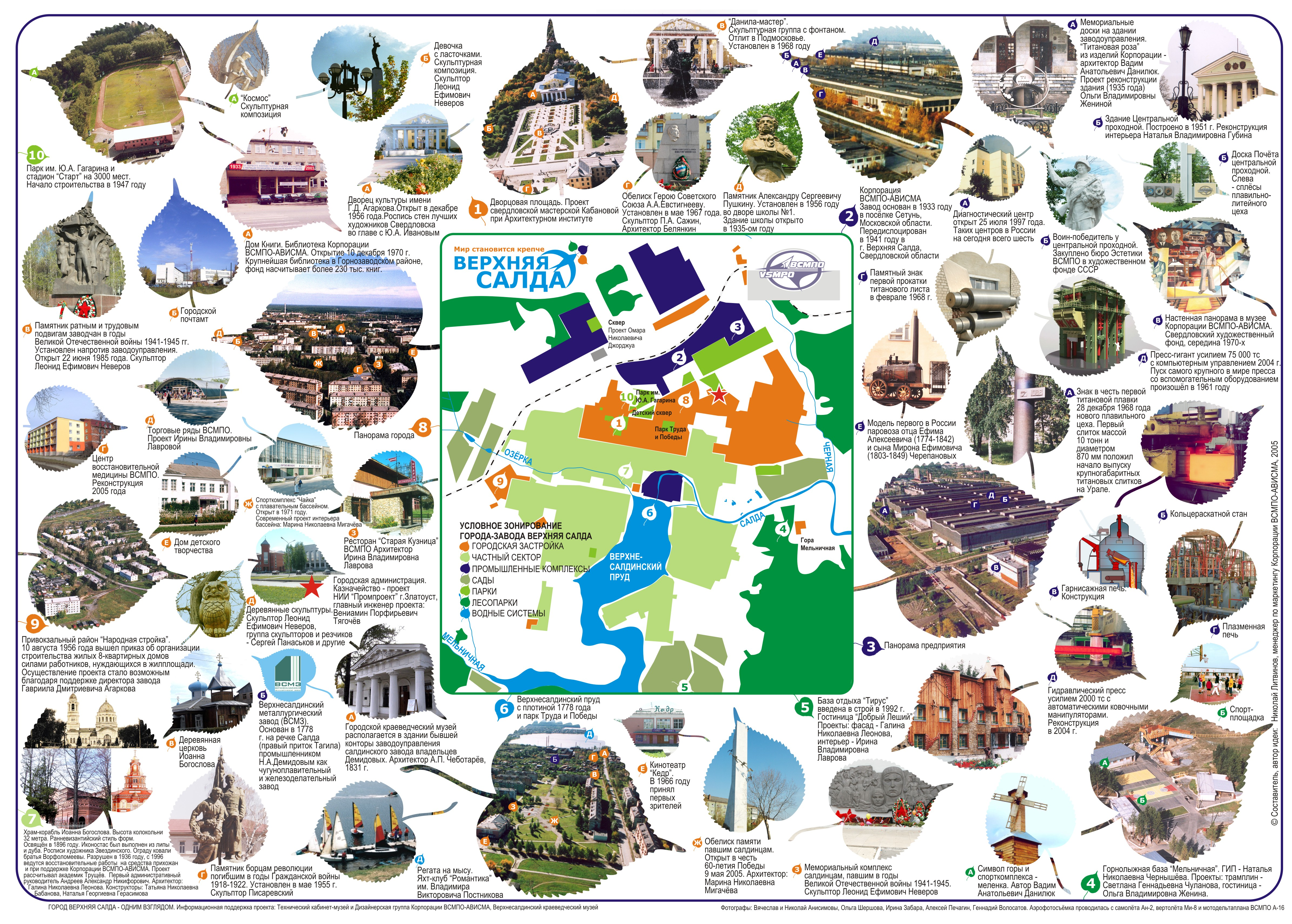 Для статьи "Верхня Салда". Источник: Литвинов Н.Н. Бренд-стратегия территорий. Алгоритм поиска региональной идентичности (часть 2) // Бренд-менеджмент. — 2010. — №5(54). — С. 309.